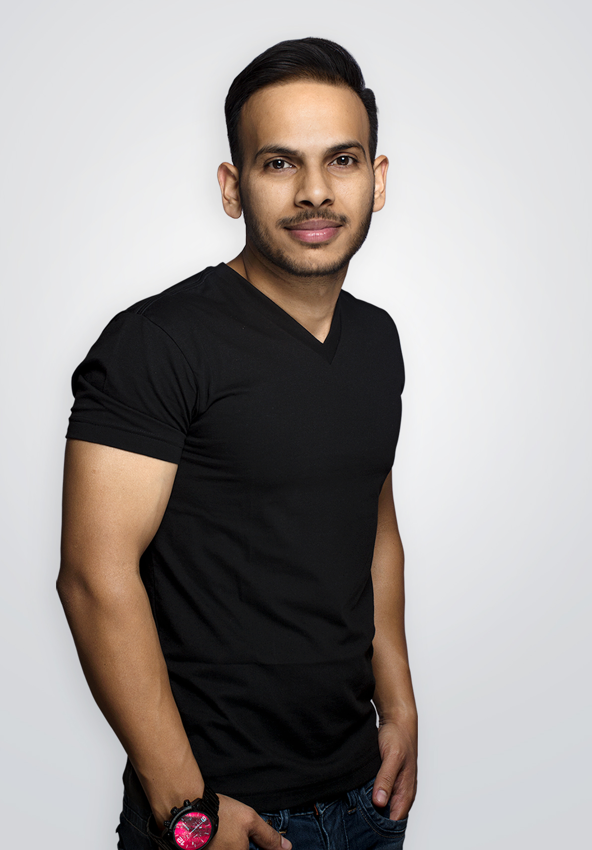 ਪੰਜਾਬੀ: ਡਾ. ਨਵਦੀਪ ਸਿੰਘ